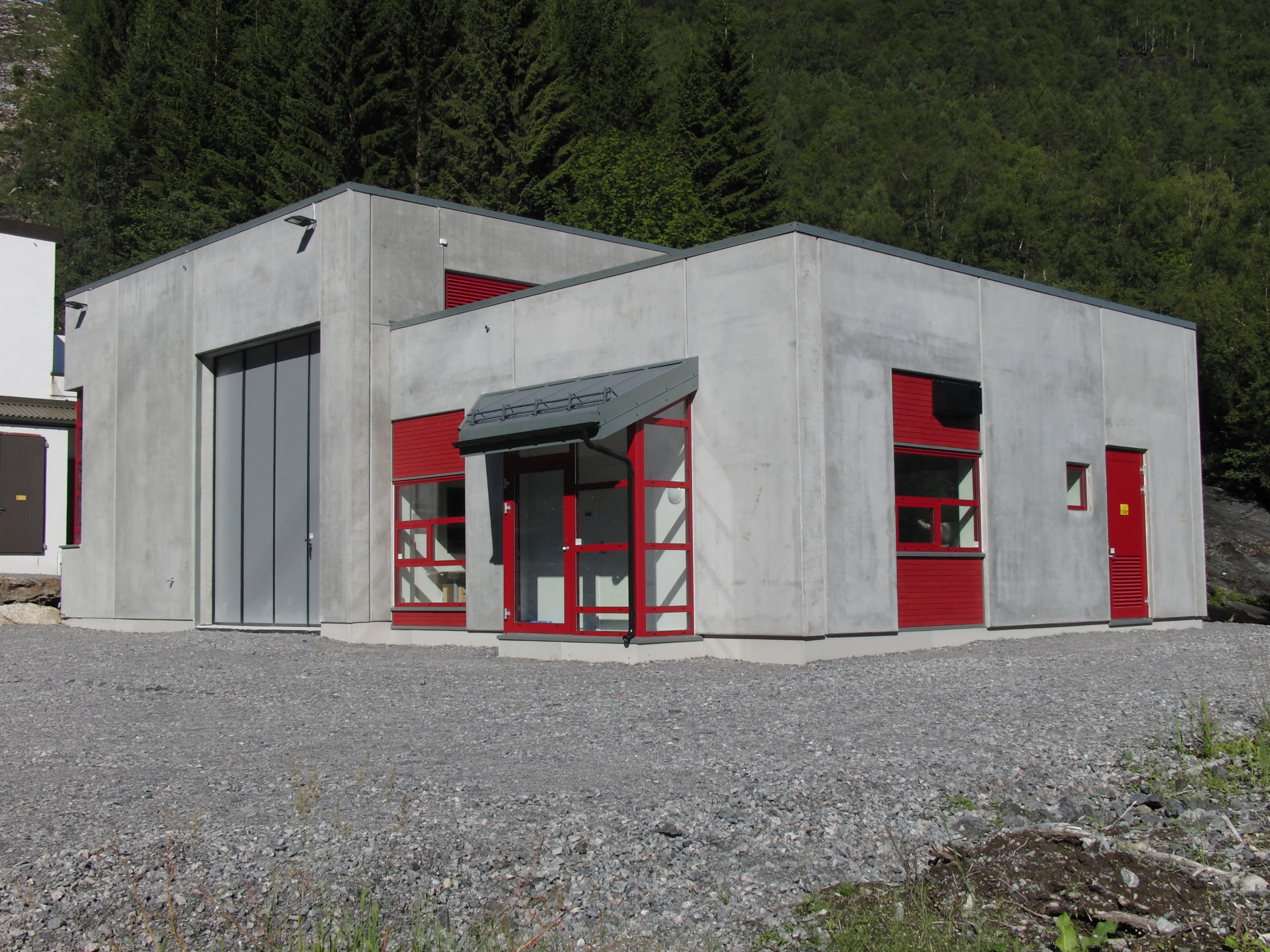 Riksheim kraftverk